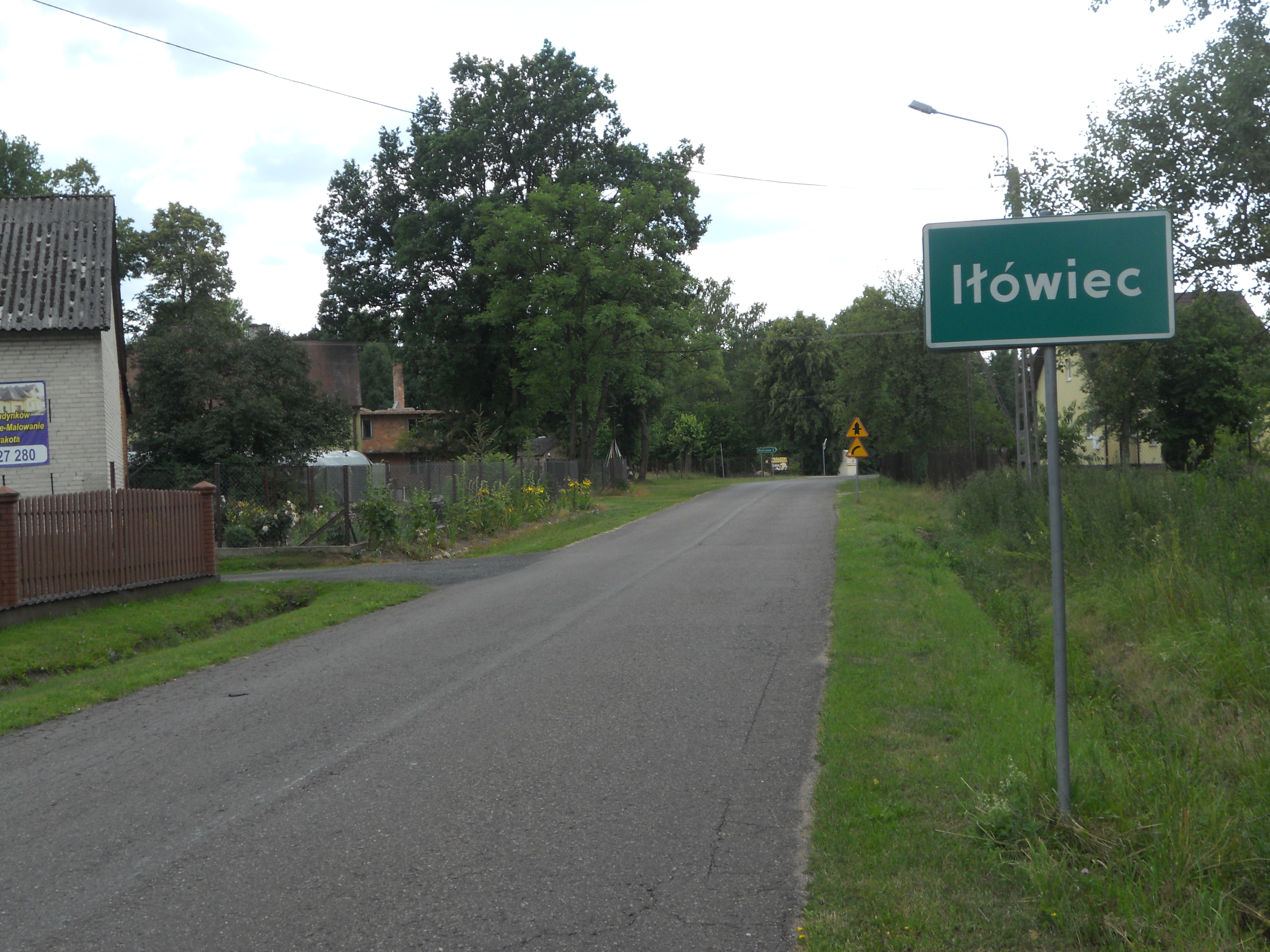 Miejscowość w gminie Mińsk Mazowiecki